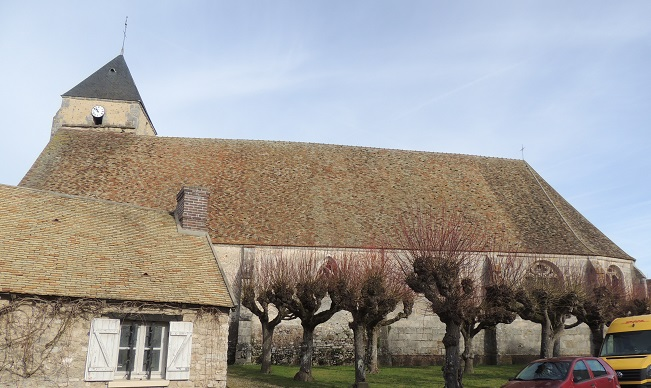 Église Saint-Lubin, facade Sud avec le bas clocher dépassant la nef à gauche, les fenêtres gothiques et l'amorce du chevet à droite derrière un premier plan de pelouse et d'arbres en hiver et une maison à gauche